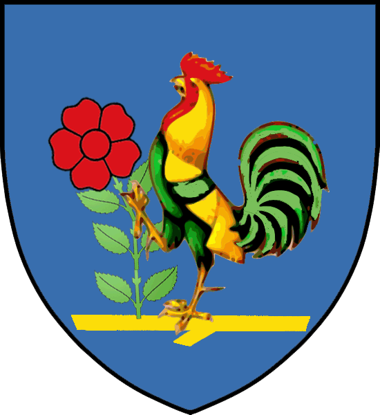 Vapensköld för svenska adelsätten Rosenhane